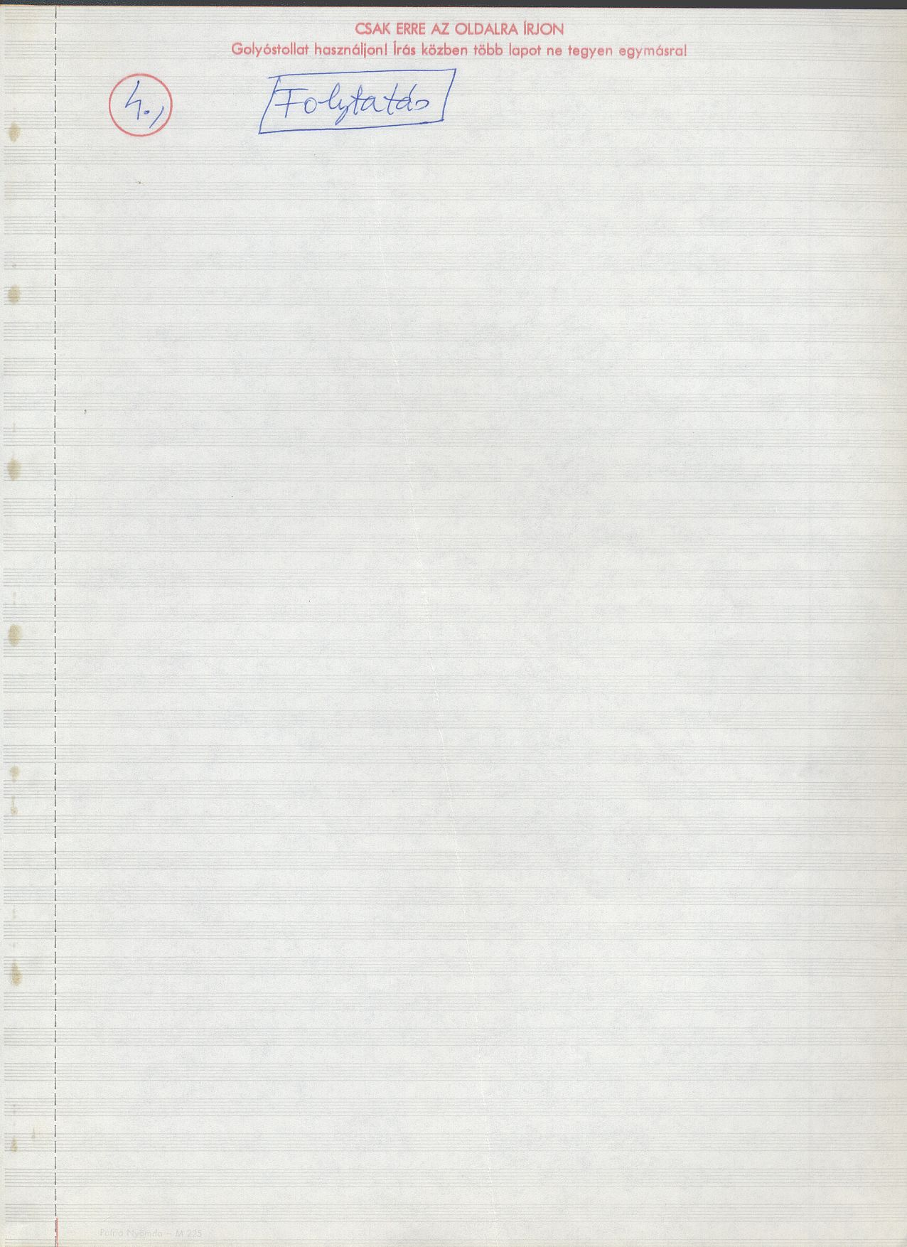 Központi (összevont) érettségi-felvételi vizsgához használt indigós papír